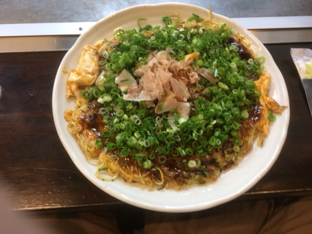 広島県府中市のＢ級グルメ 府中焼き 広島焼のキャベツを減らして、肉をミンチ肉にしたもの。